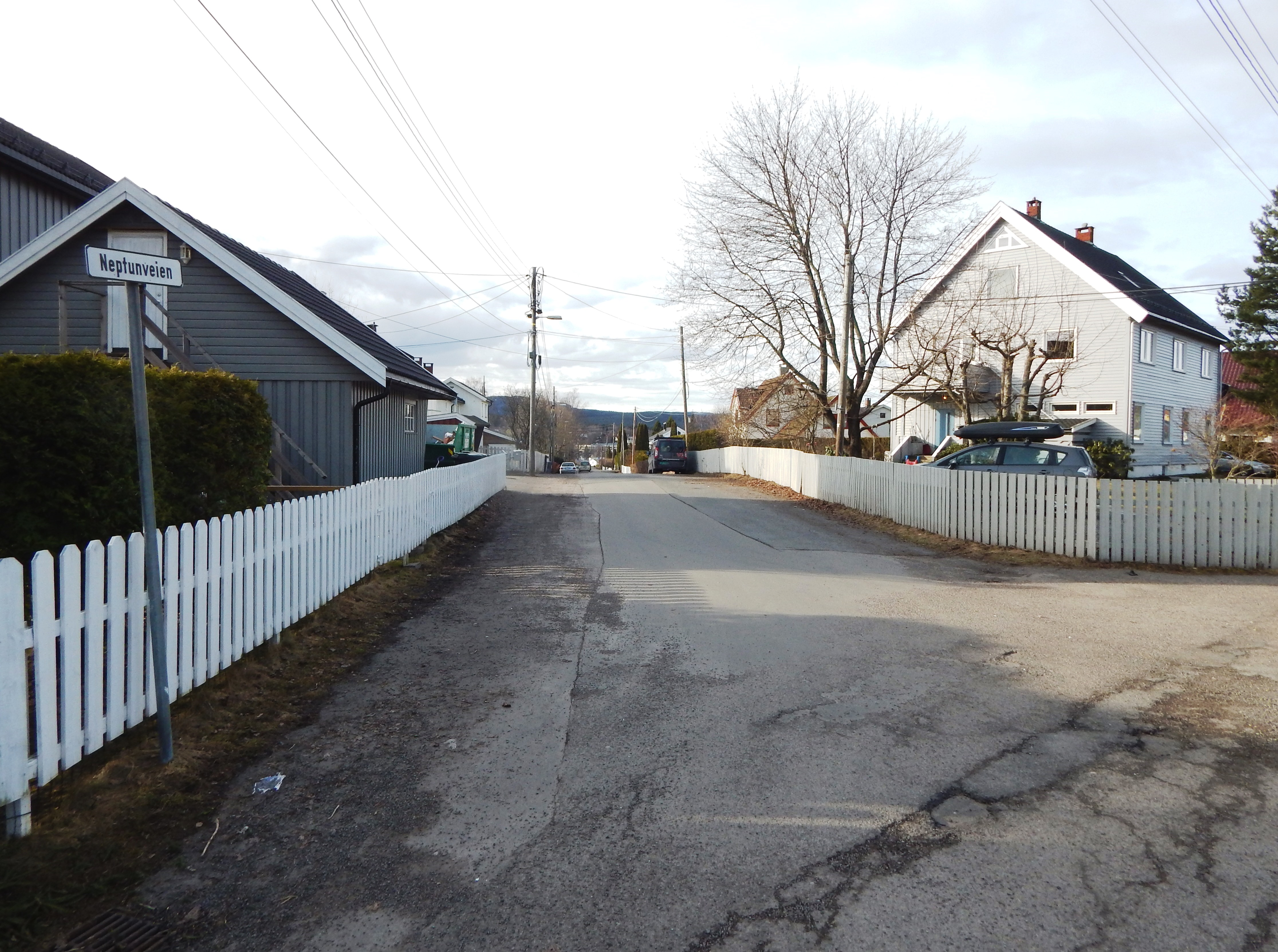 Neptunveien på Grefsenplatået